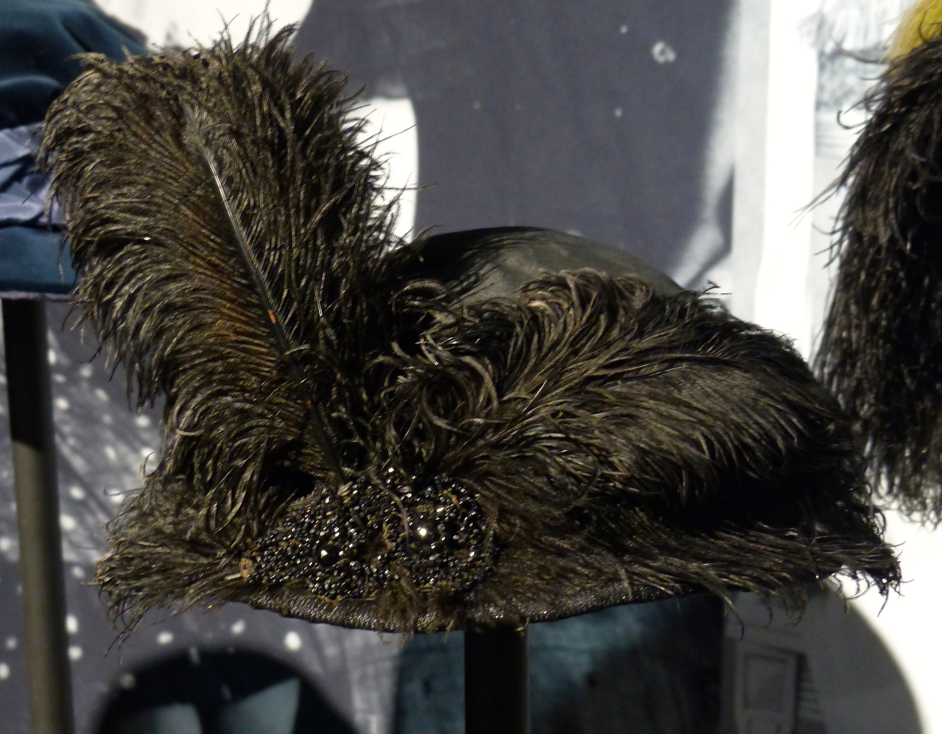 LVR Industriemuseum Cromford Chapeau!: Schwarzer Hut mit Reiherfeder (1910er Jahre)